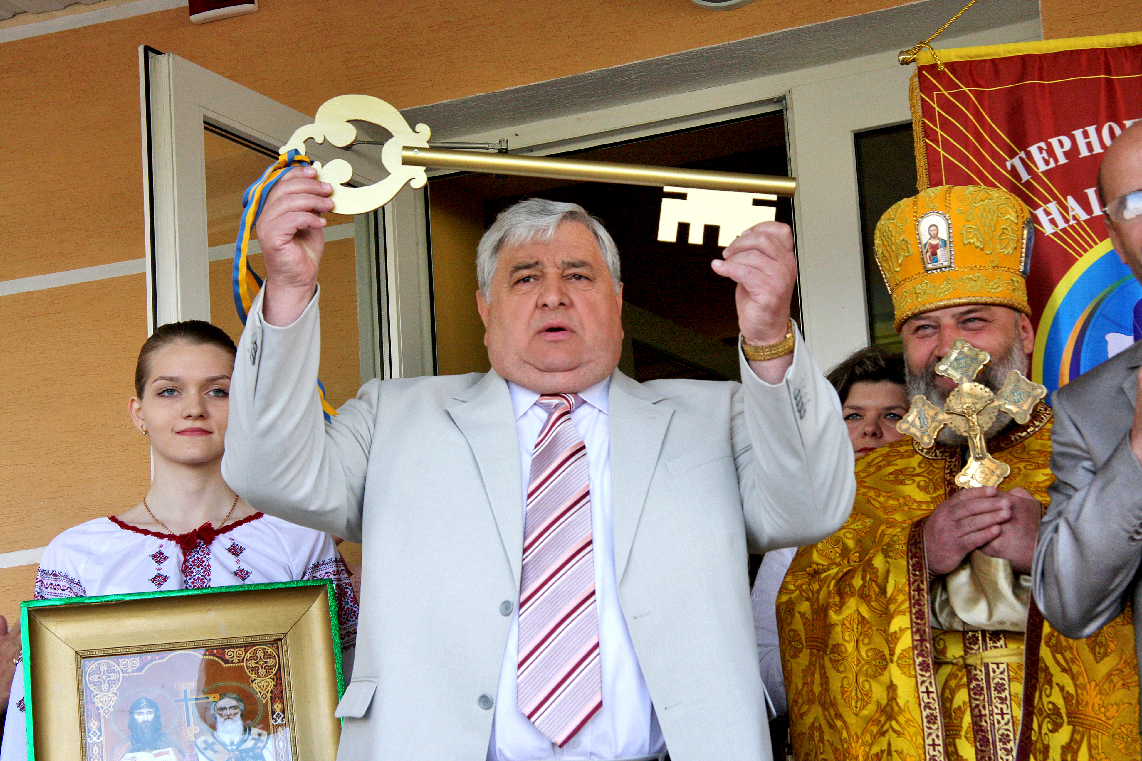 Ключ до знань та успіхів. Символічний ключ до дверей нової бібліотеки